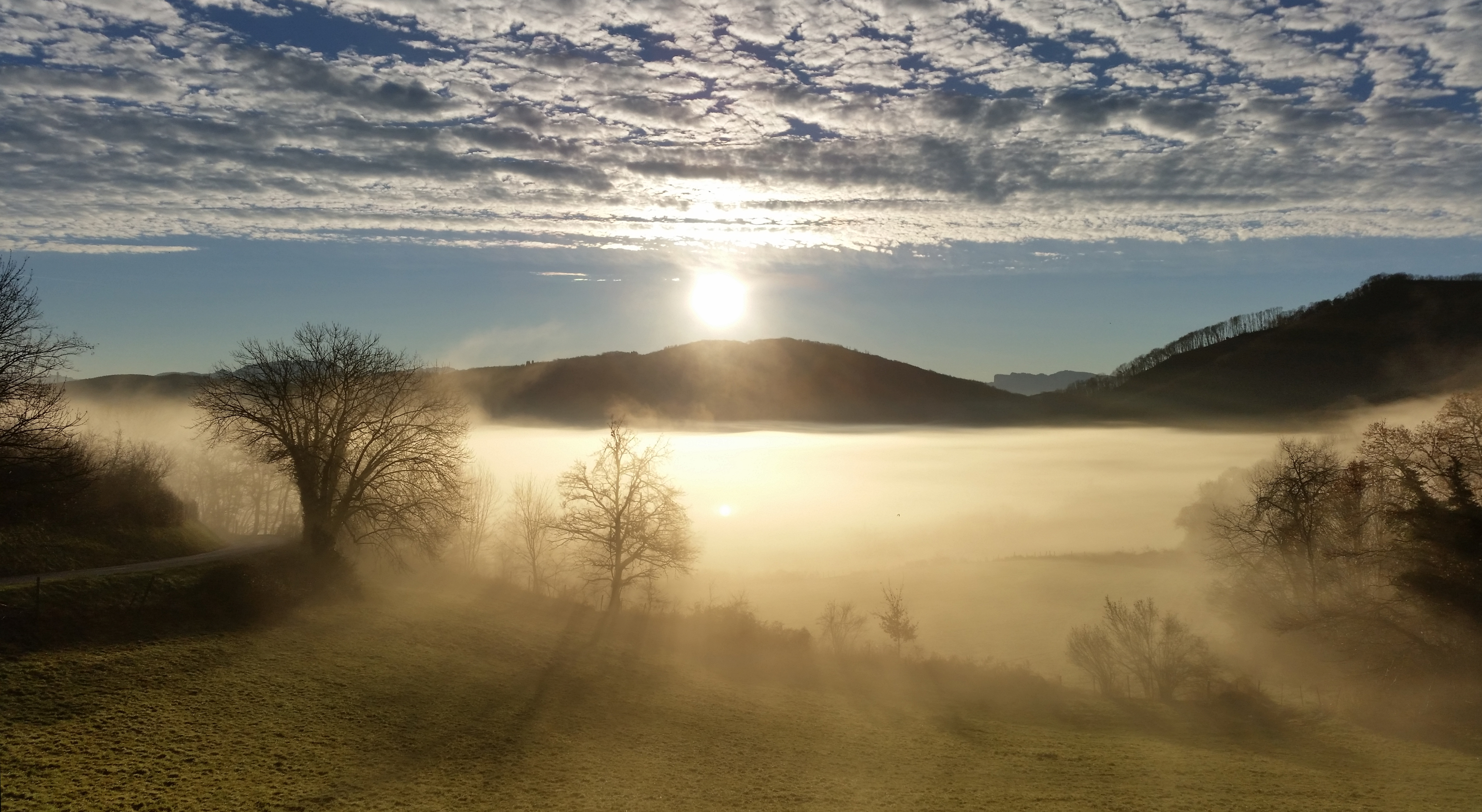 Vue de la Tourbière du Grand Lemps avec brume sous nuages